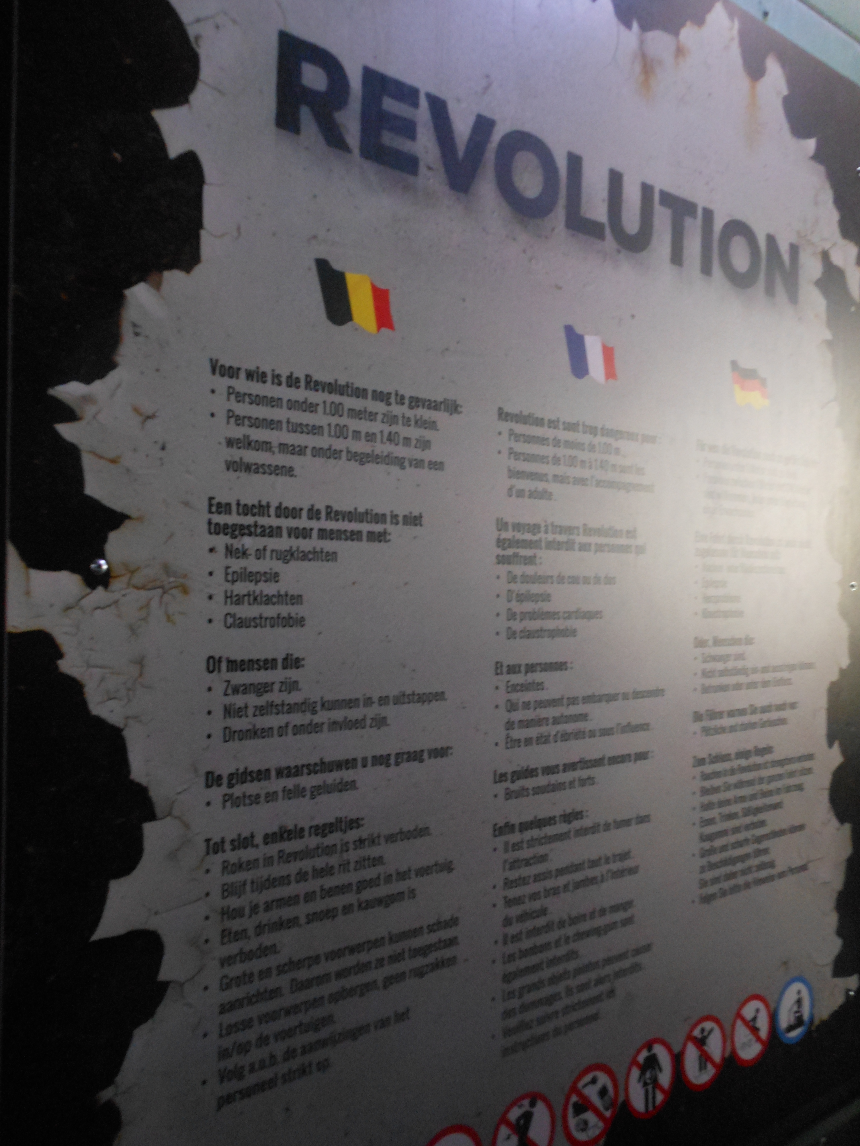 Het informatiebord bij de achtbaan Revolution in Bobbejaanland, een achtbaan van het model Illusion van de Nederlandse achtbaanbouwer Vekoma, gebouwd in 1989. Het bord vertelt wie wel of niet in de attractie mag, al dan niet onder begeleiding, en wat je wel of niet mag doen of meenemen in de trein.